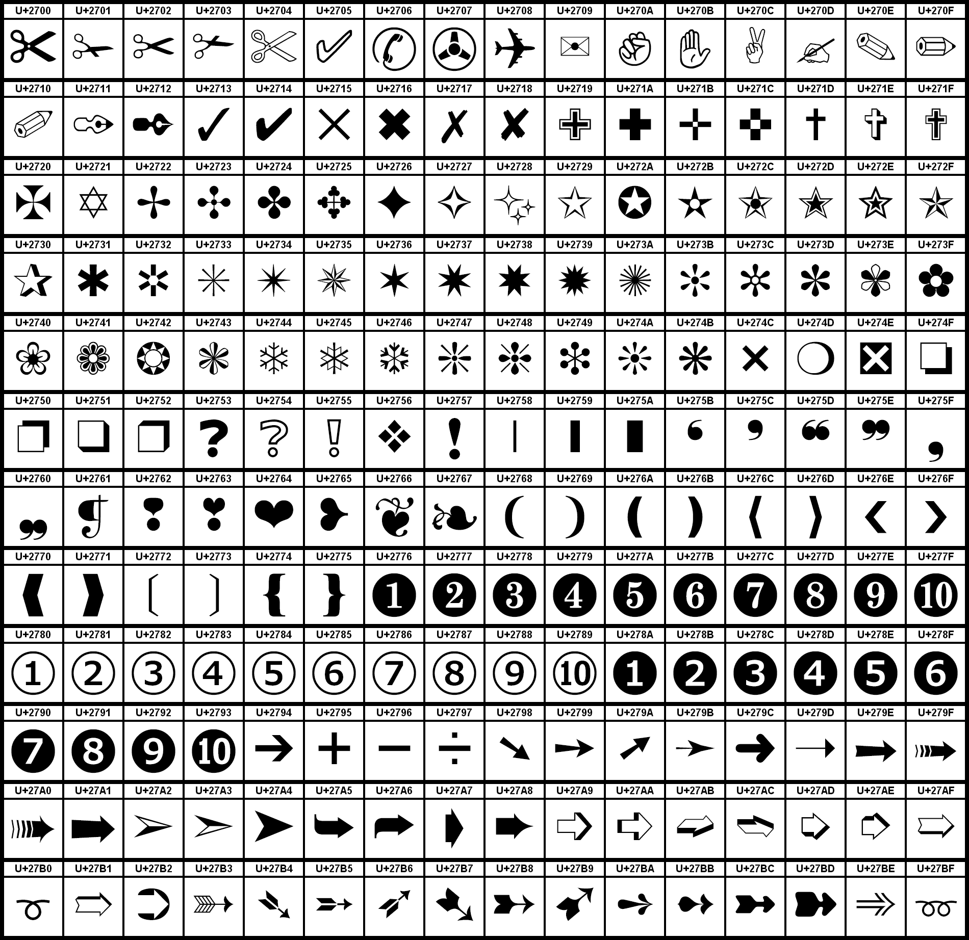 Grafiktafel für den Unicodeblock Dingbats.